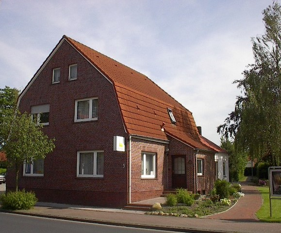 Dübel haus